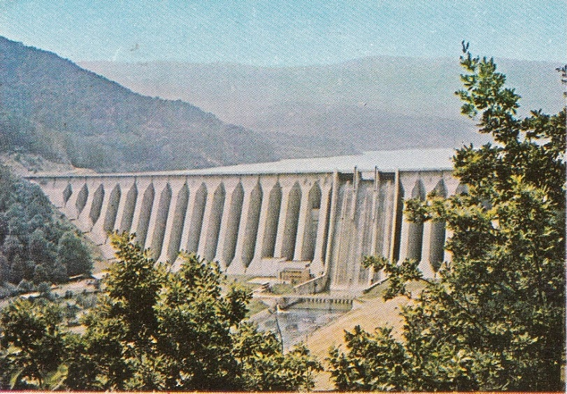 Lacul Poiana Uzului de pe teritoriul localității Dărmănești din județul Bacău.